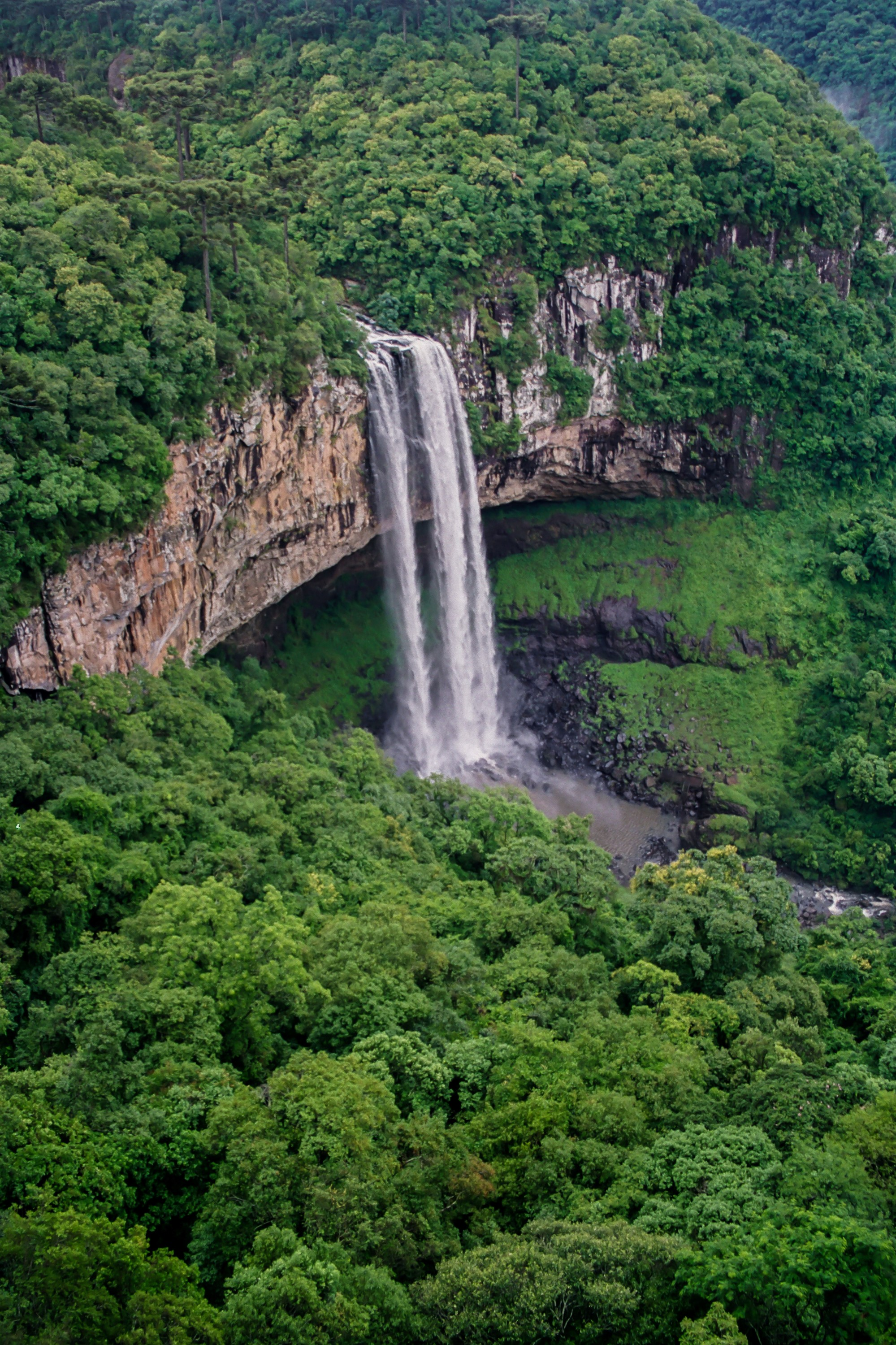 Cachoeira do Caracol localizada no Parque Estadual do Caracol.